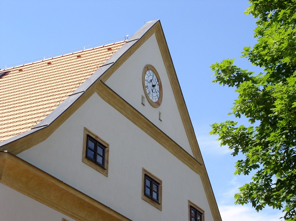 Klikovka – one of old estates in Prague